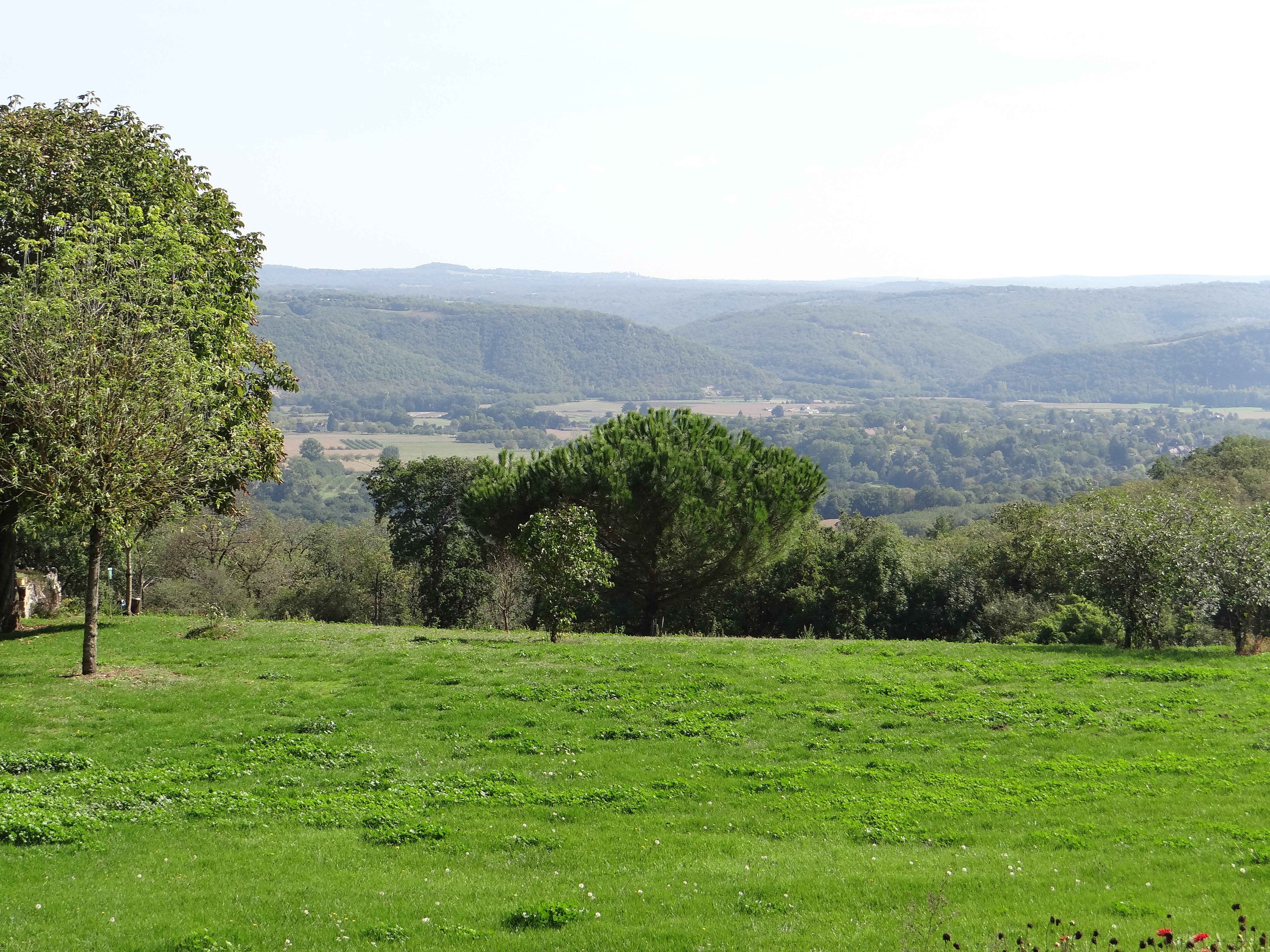 Point de vue sur la vallée de la Dordogne depuis le côté de l'église de Mayrac (Lot, France) au fond Saint-Sozy